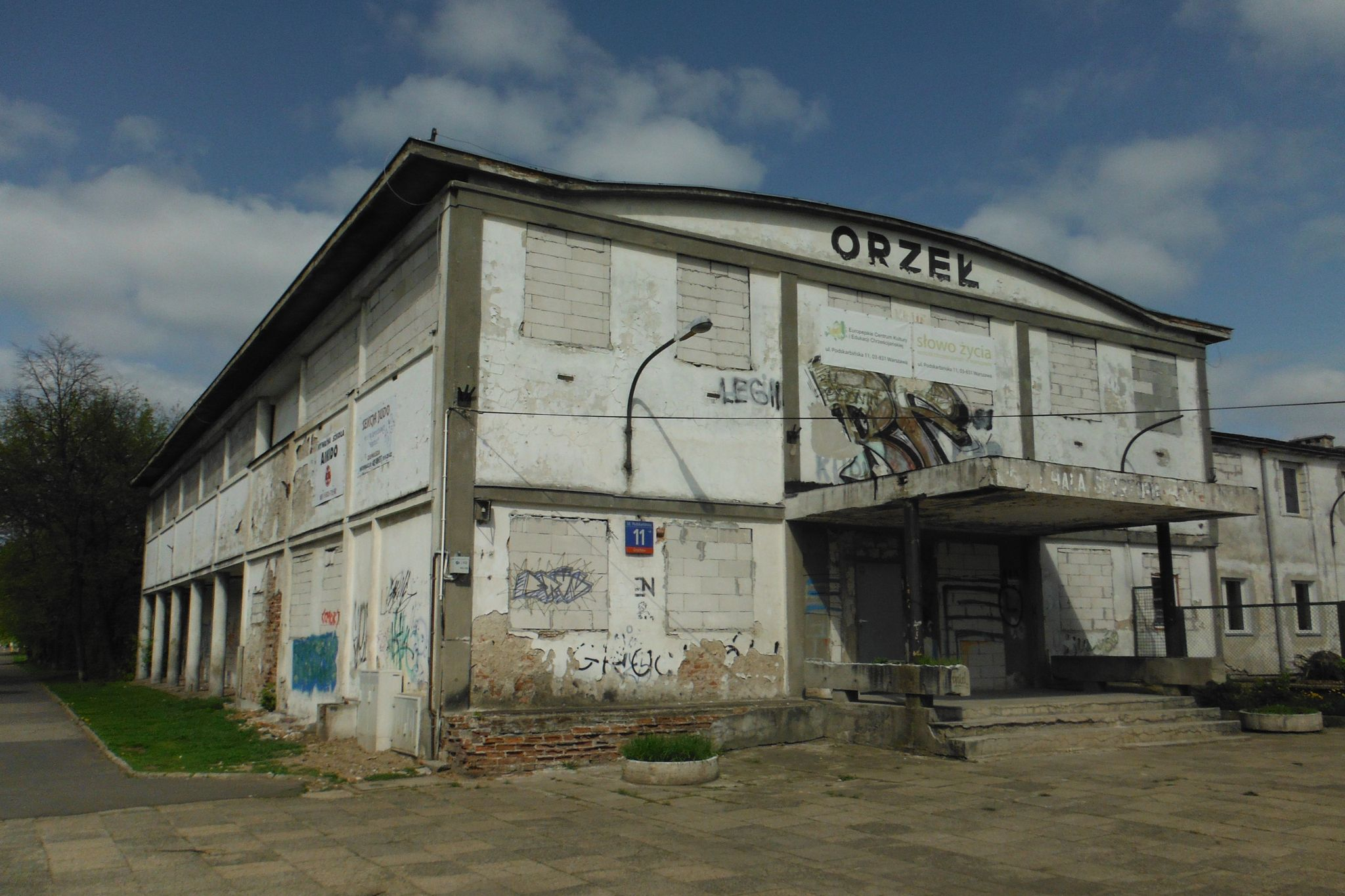 Obiekt Klubu Sportowego "Orzeł" przy ulicy Podskarbińskiej w Warszawie.